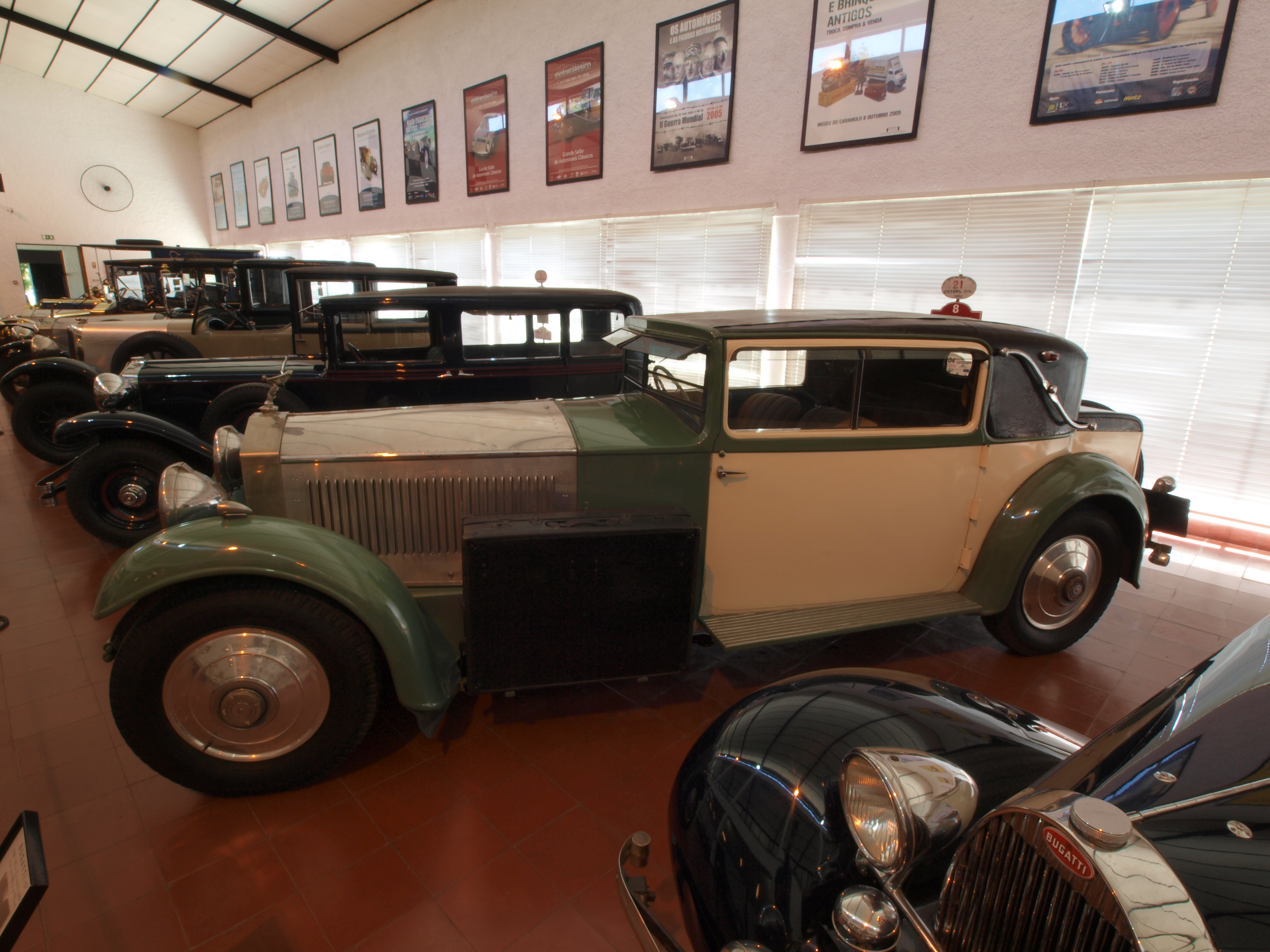 Photographed at the Caramulo museum, 'Museu do Caramulo', Caramulo, Portugal. OLYMPUS DIGITAL CAMERA